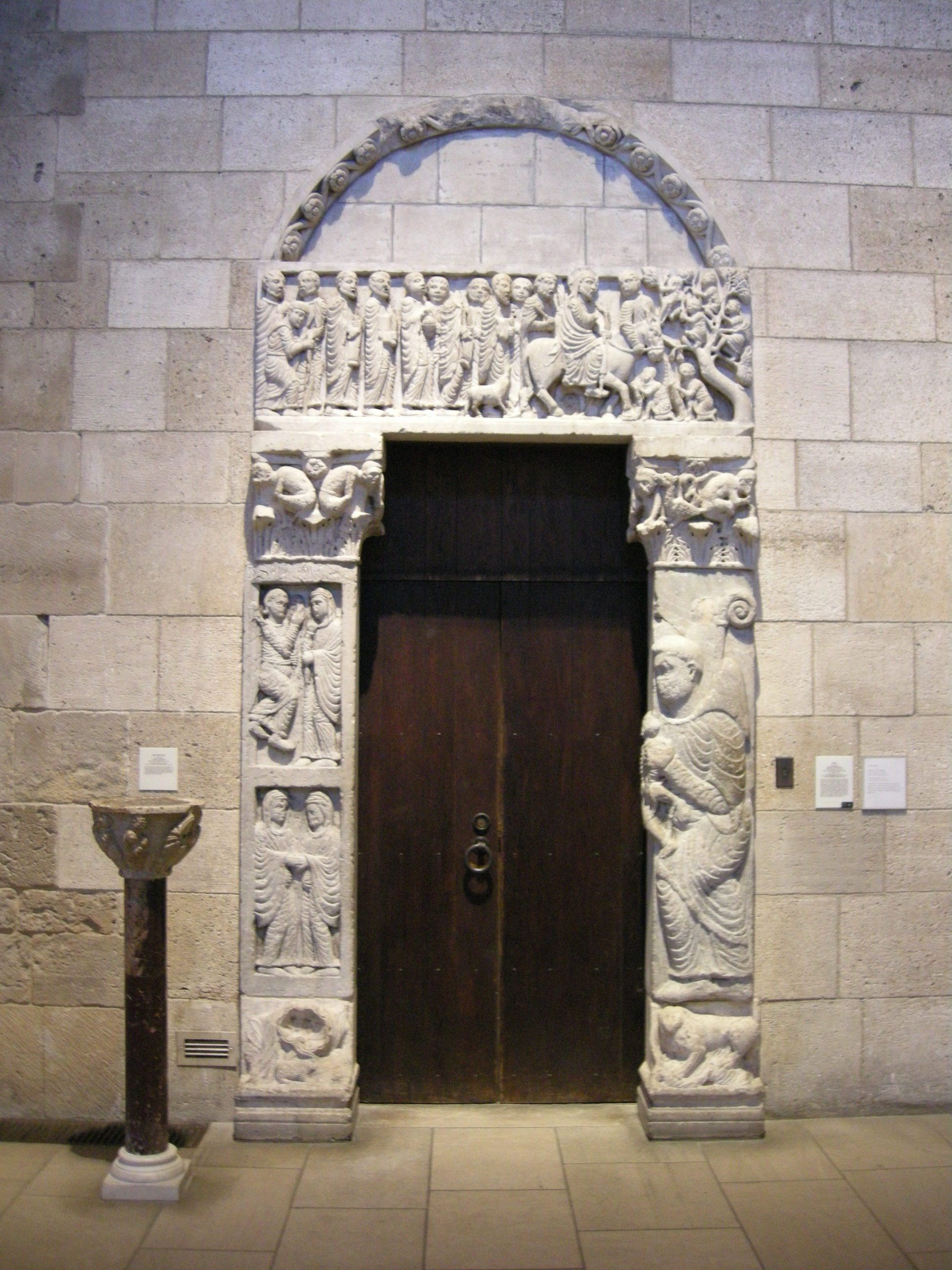 Scuola di biduino, portale da san leonardo al frigido, vicino massa carrara, 1170-1180 circa